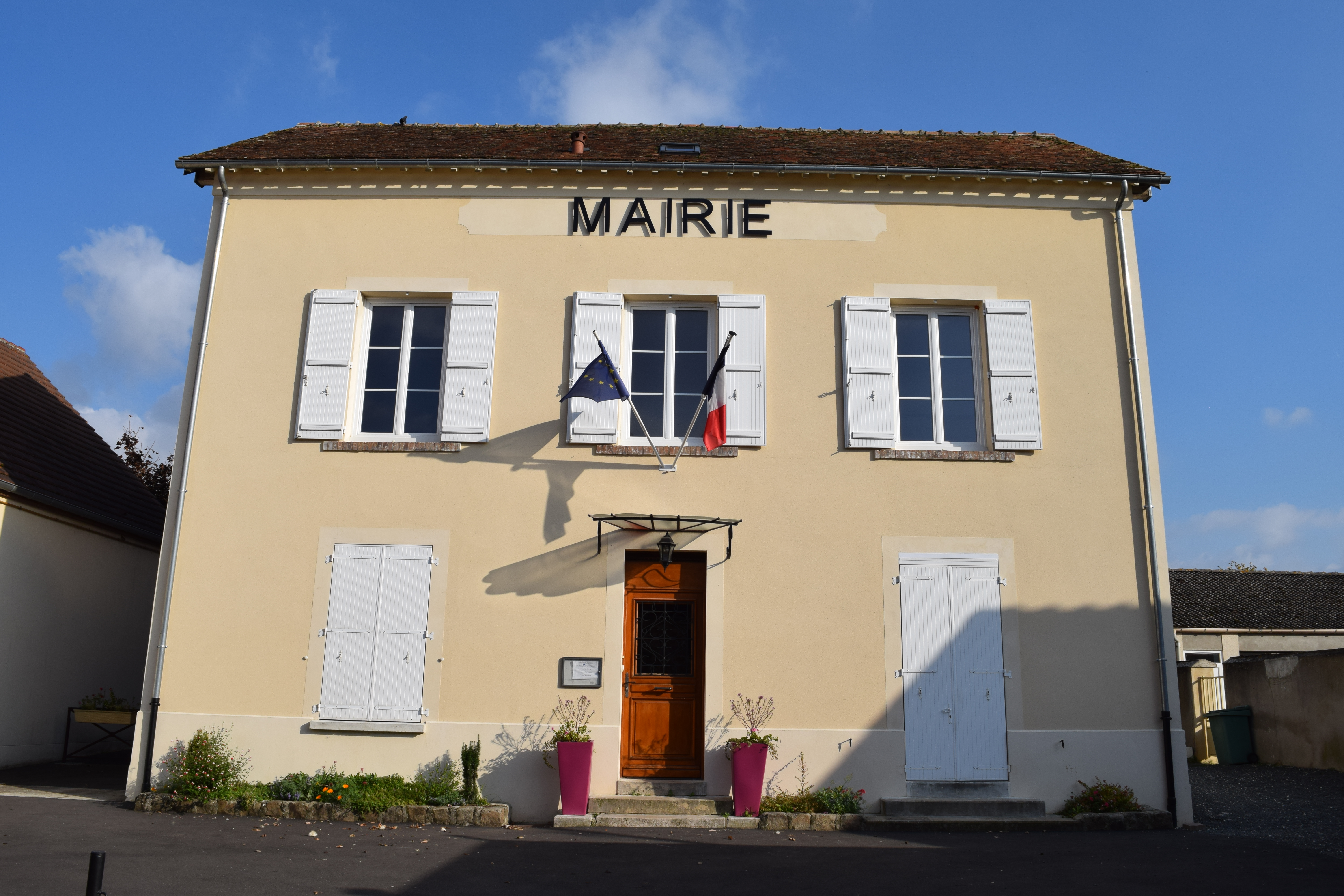 Mairie du village de Fouju